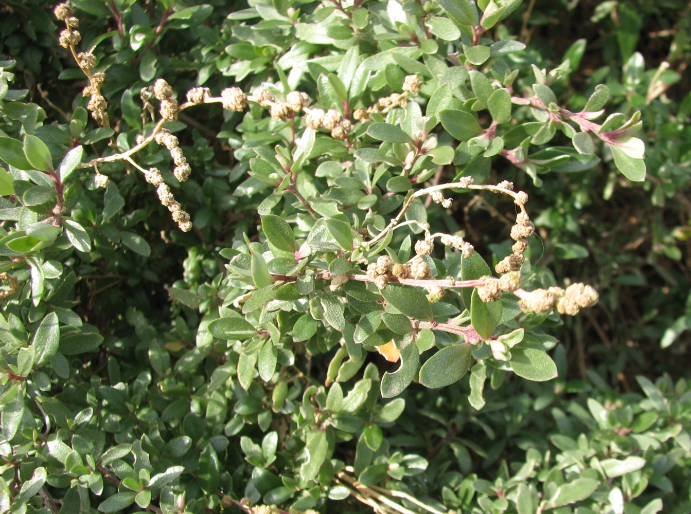 Atriplex paludosa, Altona Coastal Park, Victoria, Australia